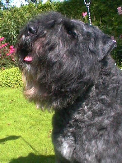 Ygor-Raiza v.d. Vanenblikhoeve